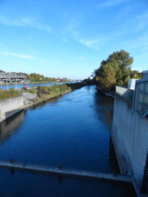 Blick in den Nordarm der Donau von der Brücke der Staustufe; nördlich (links) der Europakanal, der erkennbar höher liegt